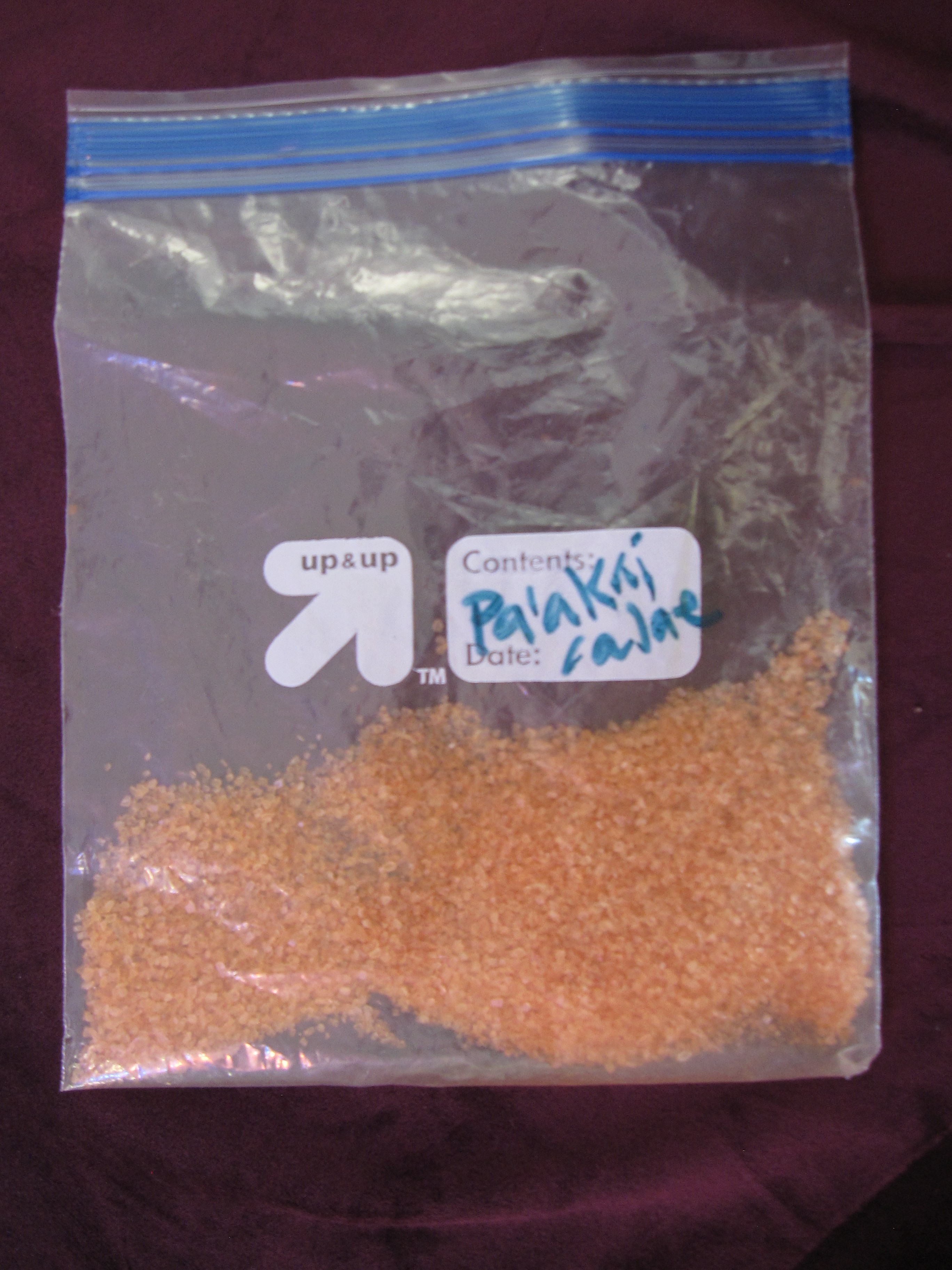 Hawaiʻi: Paʻakai